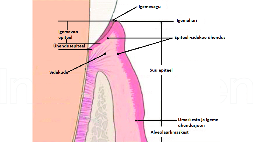 Igeme mikroskoopilised tunnused